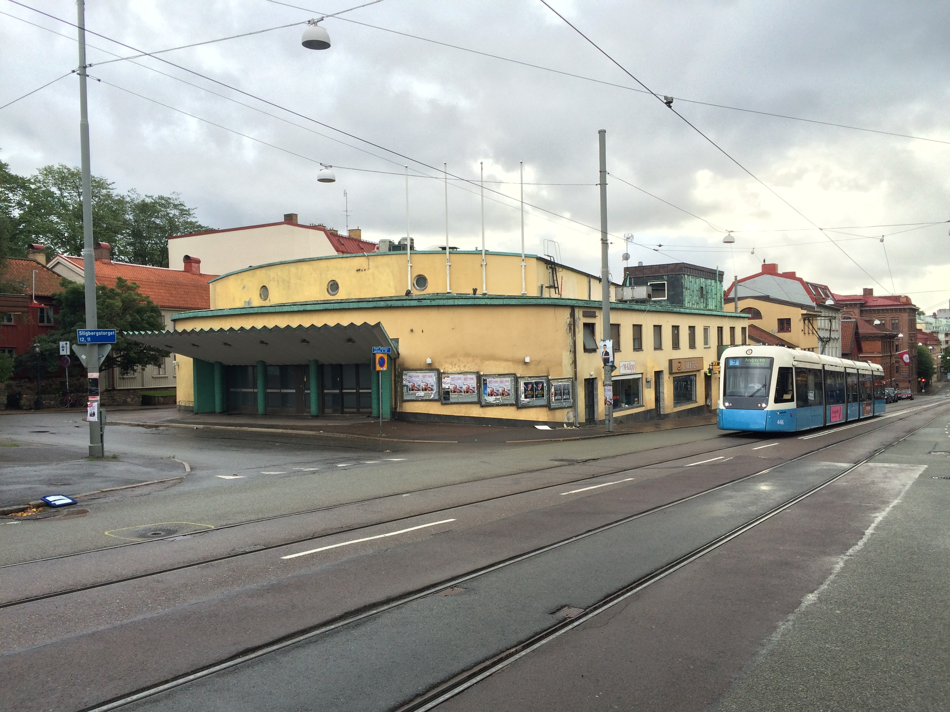 Tidigare biografen Kaparen vid Stigbergstorget i Göteborg med spårvagn 9 på Karl Johansgatan.